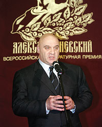 Учредитель Всероссийской историко-литературной премии "Александр Иосифович Ебралидзе" генеральный директор ОАО "Талион" г. Санкт-Петербург" на церемонии награждения лауреатов премии